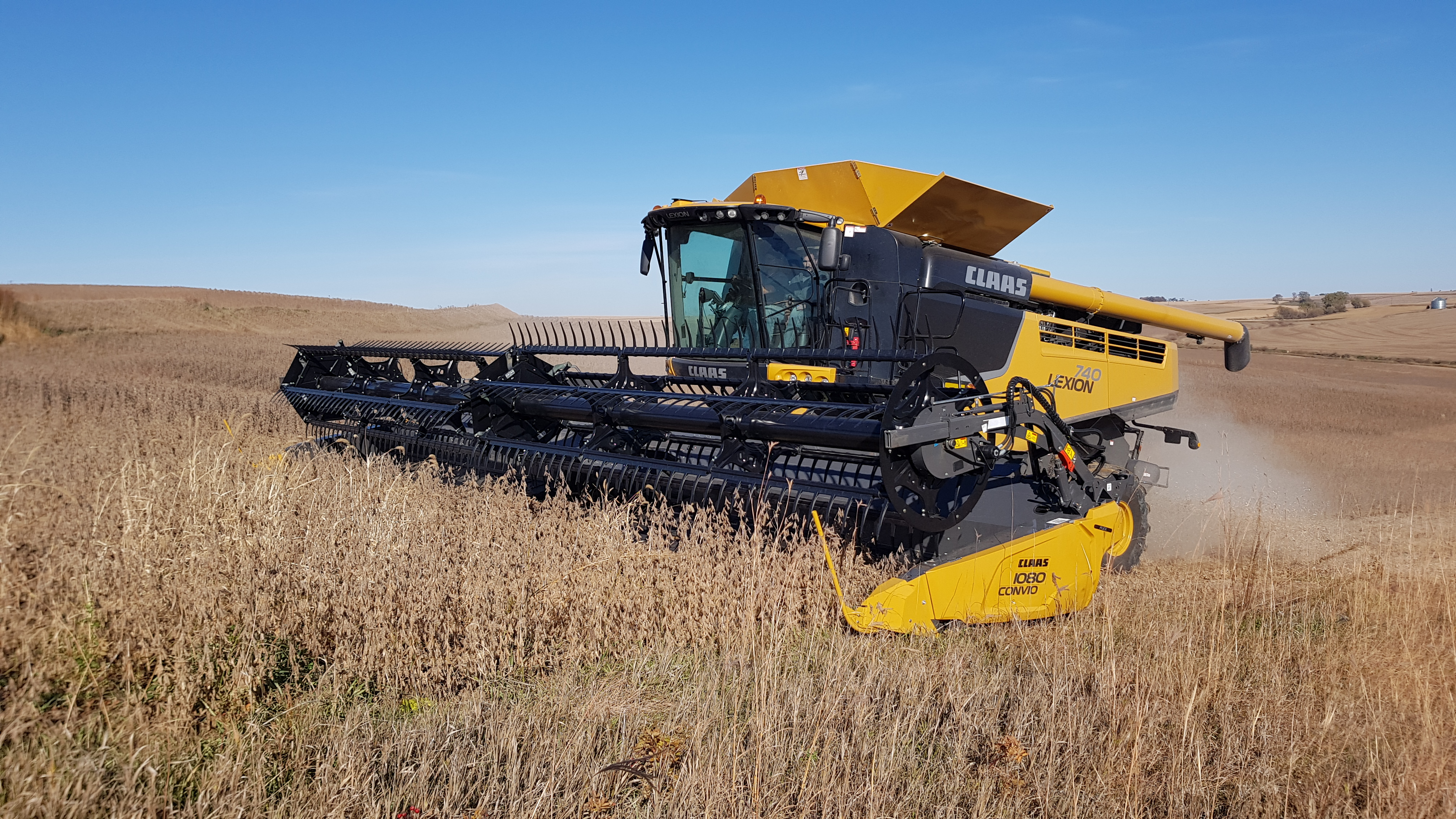 CLAAS LEXION 740 mit CONVIO 1080 in der Sojaernte